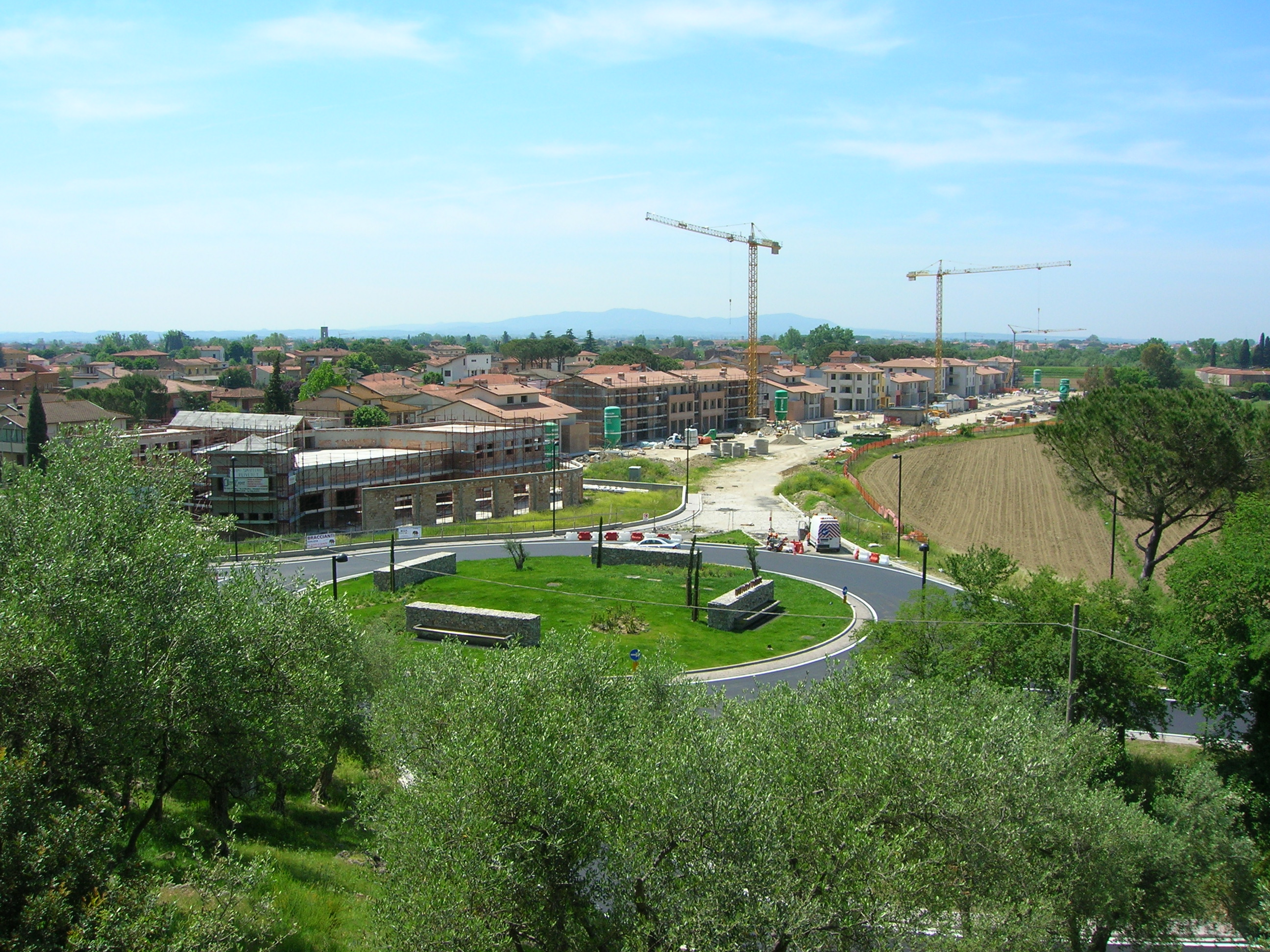 Nuovo quartiere in costruzione a Uliveto Terme